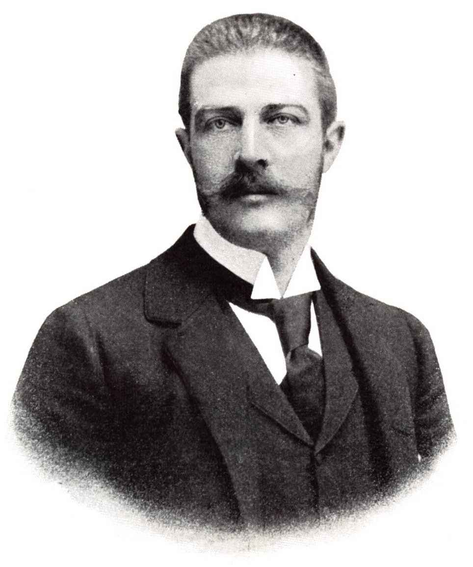 Zichy Aladár (1864-1937) polotikus